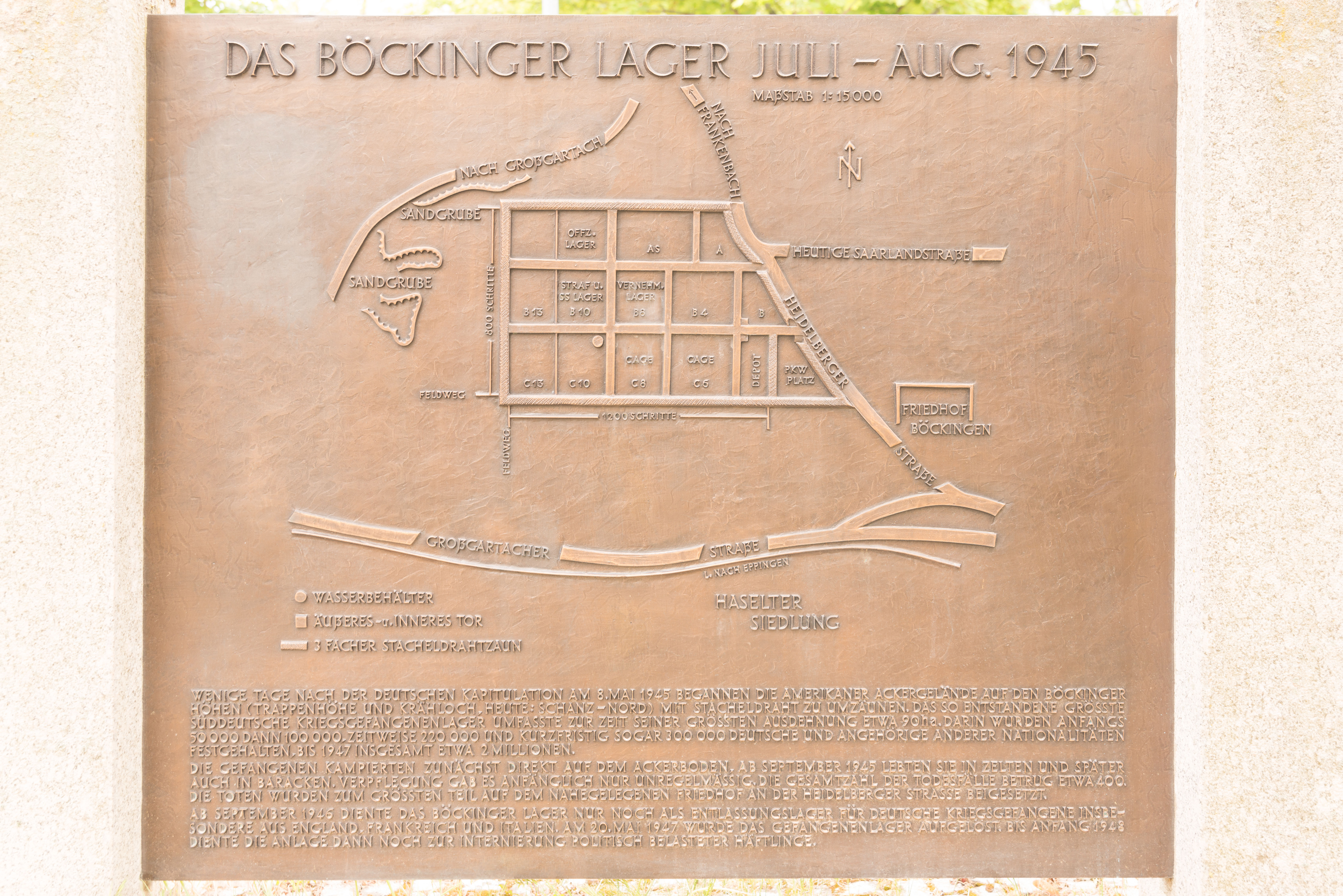 Gedenktafel in Heilbronn-Böckingen für das ehemalige Kriegsgefangenenlager in Heilbronn